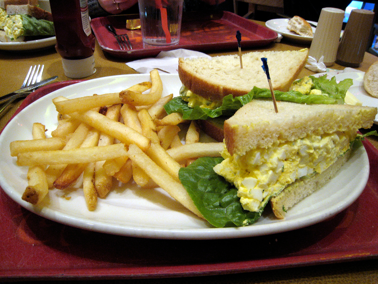 best egg salad sandwich ever, flying star, Albuquerque NM, 12/7/2007